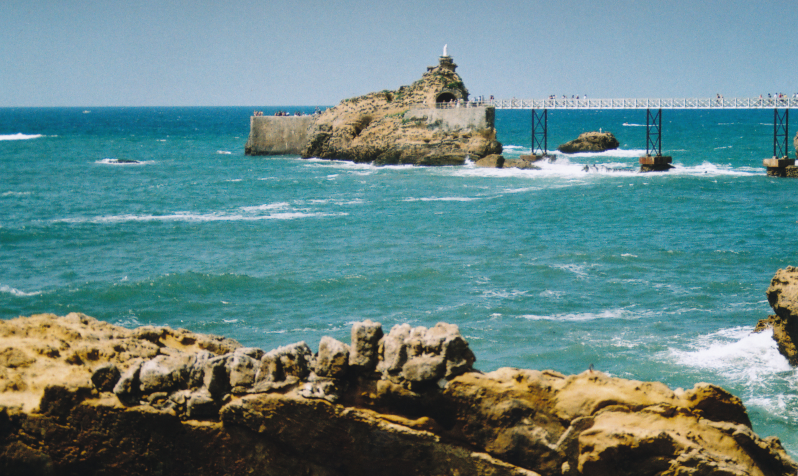 Rocher de la Vierge und Brücke G. Eiffel in Biarritz (Frankreich) Datum: 08.2006 Urheber: M. Pfeiffer alias Benutzer:Gordito1869 Quelle: privates Fotoarchiv des Urhebers (Aufnahme mit: Pentax K1000)